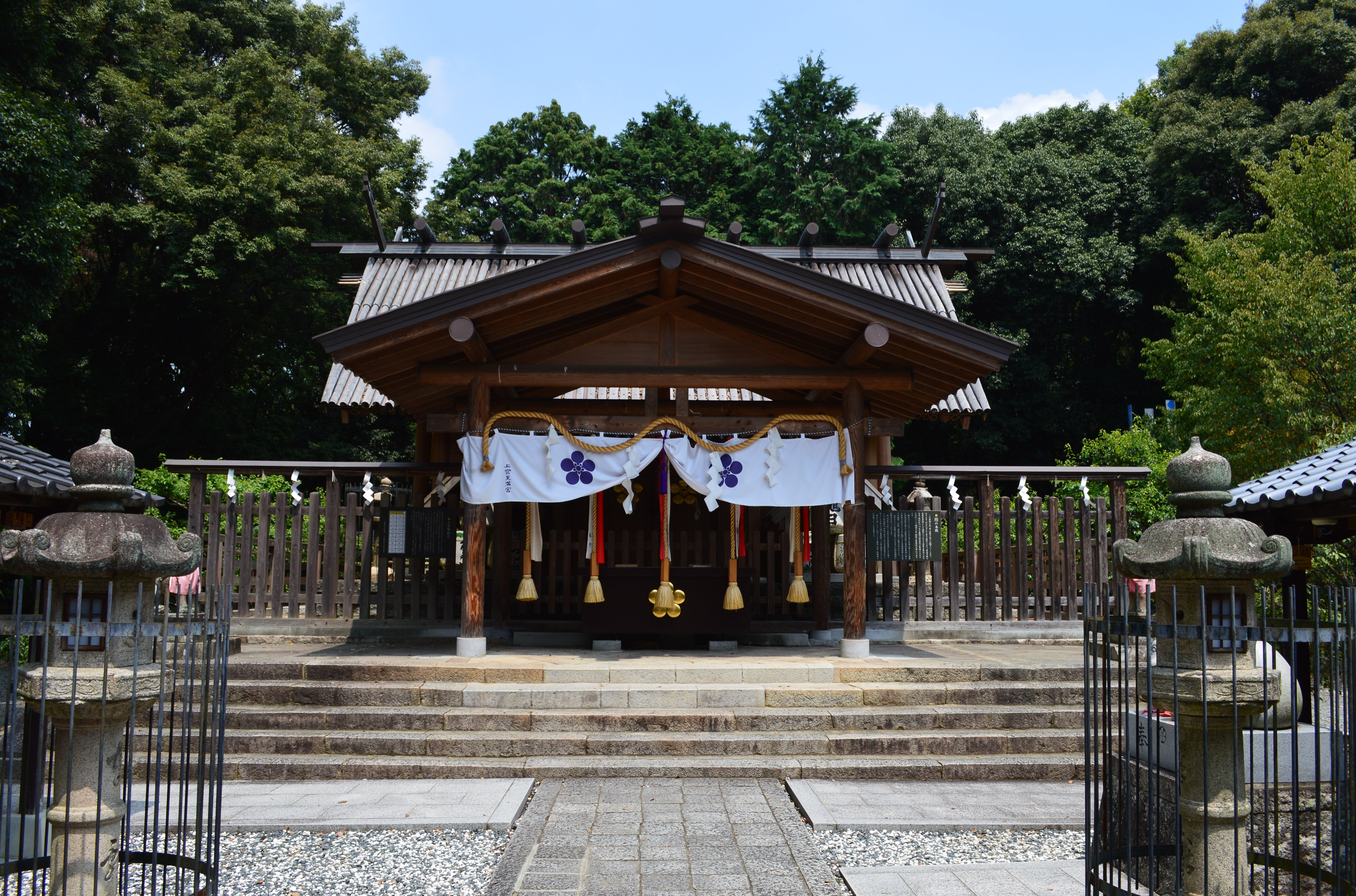 上宮天満宮 境内